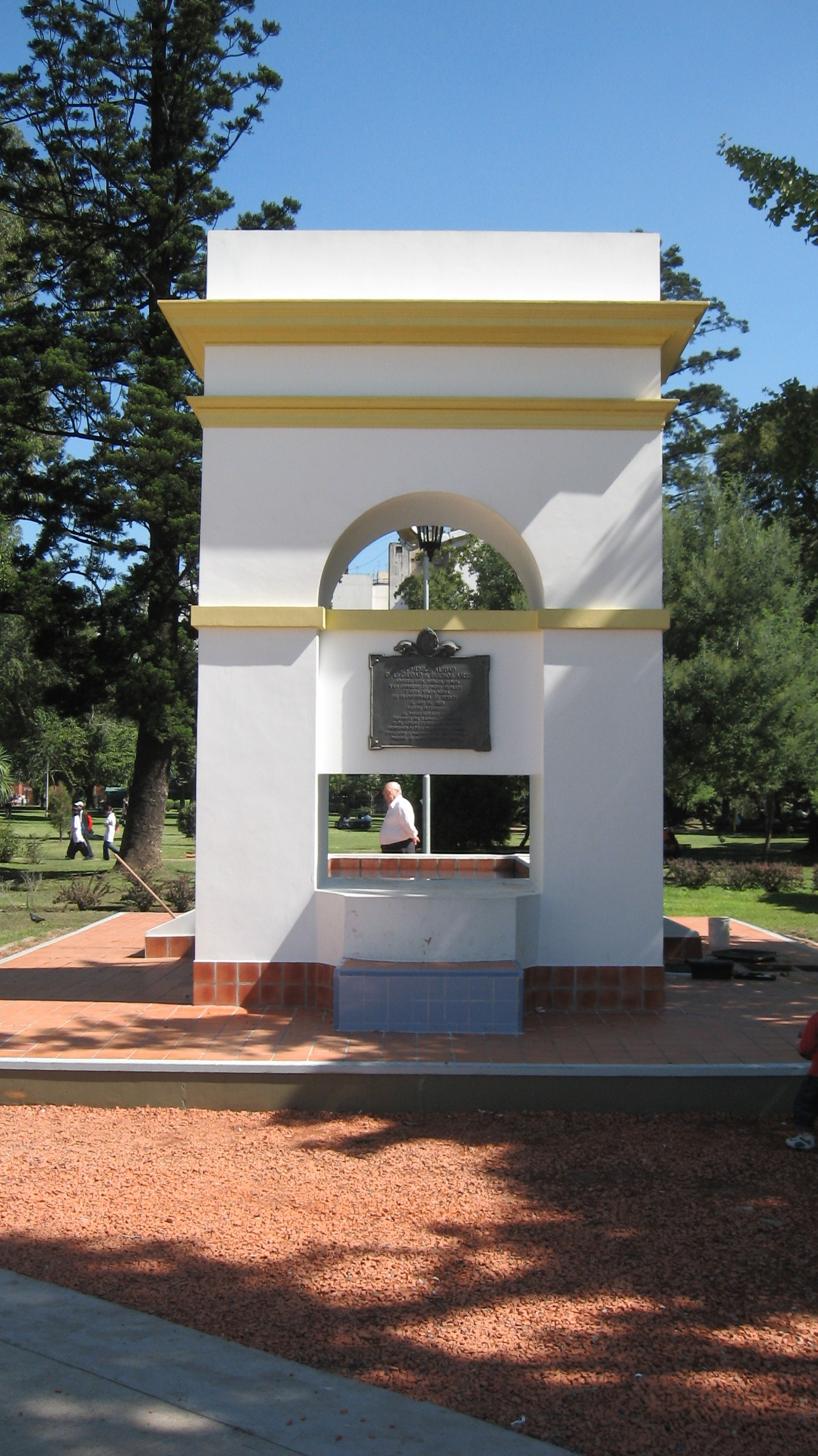 Fuente situada en el Parque Rivadavia de la ciudad de Buenos Aires, Argentina. Data de tiempos coloniales